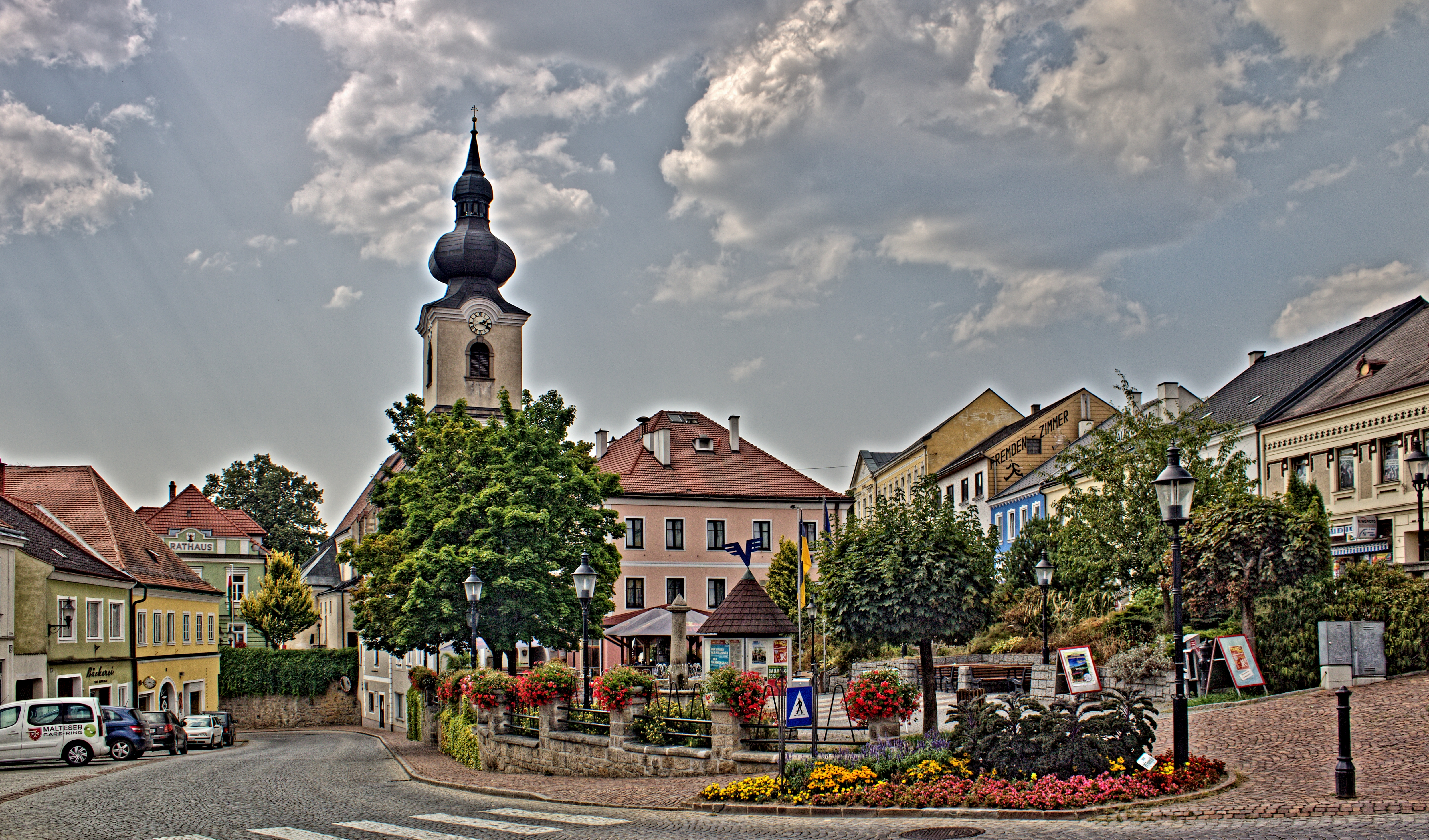 Heidenreichstein